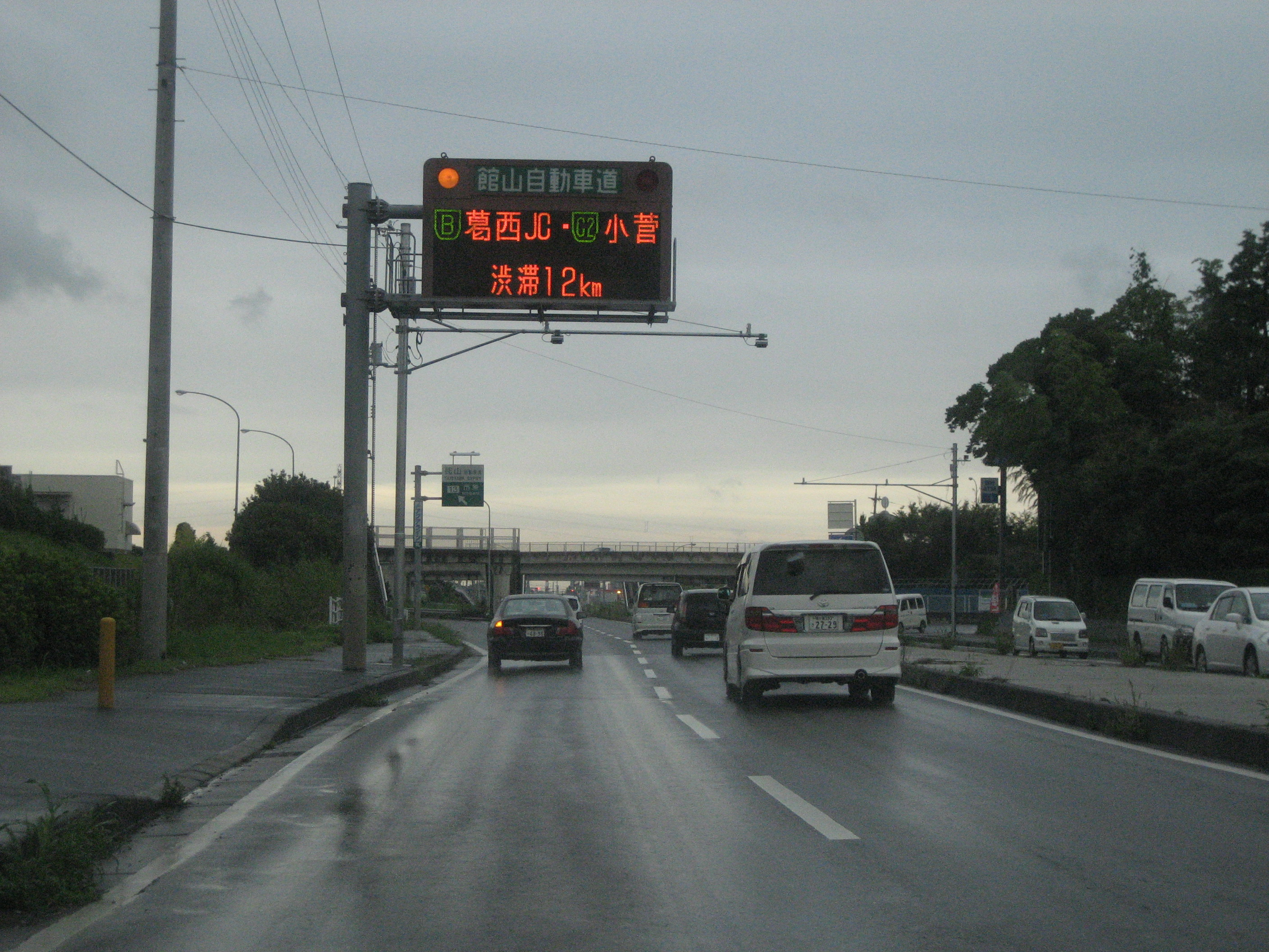 館山自動車道市原IC入口